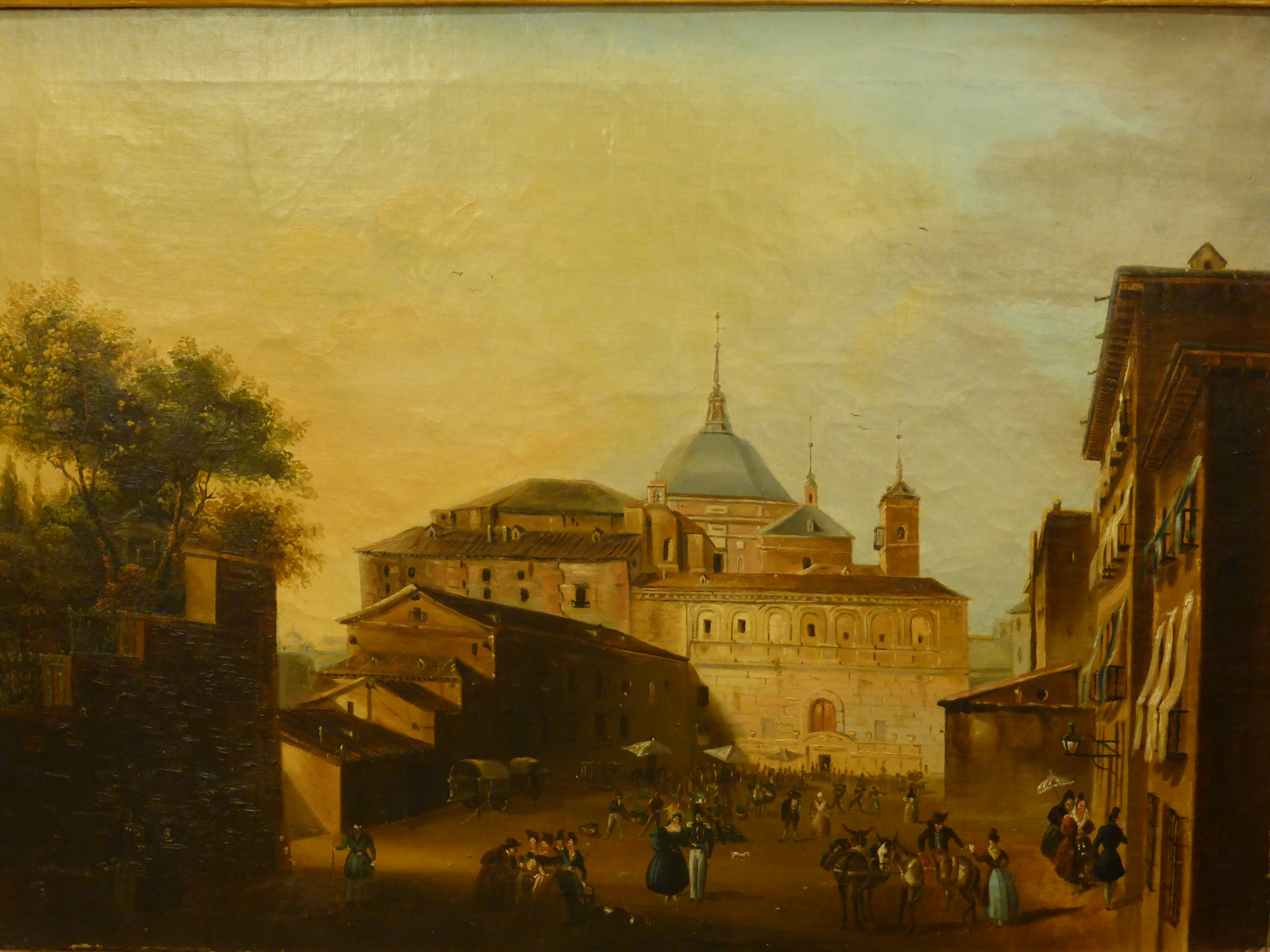 Vista de la costanilla de San Andrés, o Plaza de la Paja, en Madrid, según pintura del año 1838, de "Avrial y Flores, José María (Fecha de nacimiento: 1807 - Fecha de defunción: 1891)", según ficha del Museo de Historia de Madrid. Altura = 42 cm; Anchura = 58 cm. "La costanilla de San Andrés, tomada cerca de la calle de Segovia, con el conjunto de la iglesia de San Andrés y Capilla del Obispo. En la plaza, pequeño mercadillo".